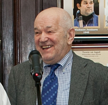 Эвалд ГрабовскийLatviešu: Ēvalds Grabovskis